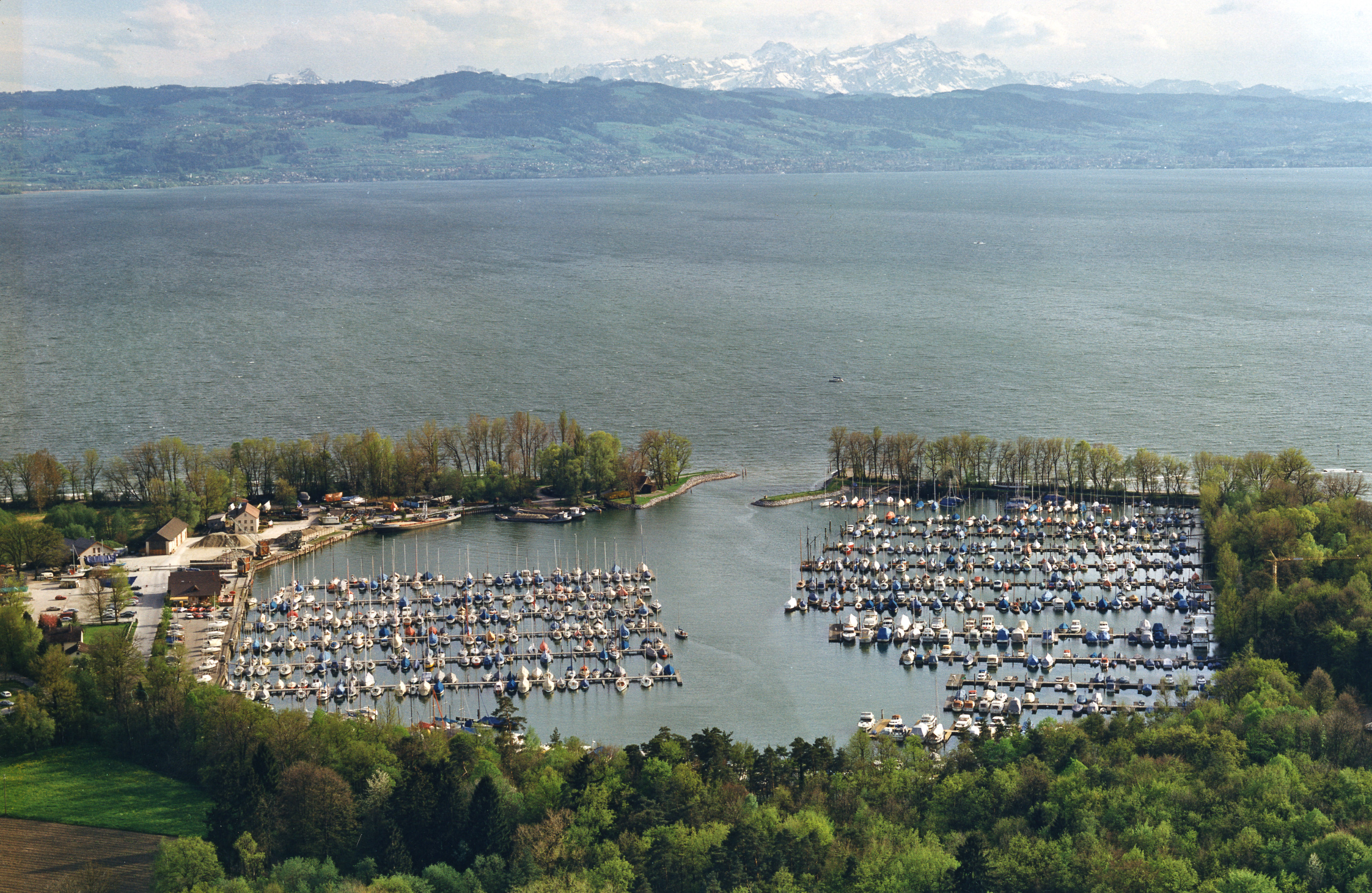 Yachthafen Kressbronn am Bodensee 1988.